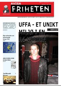 Forsiden til Friheten nr. 1 2011